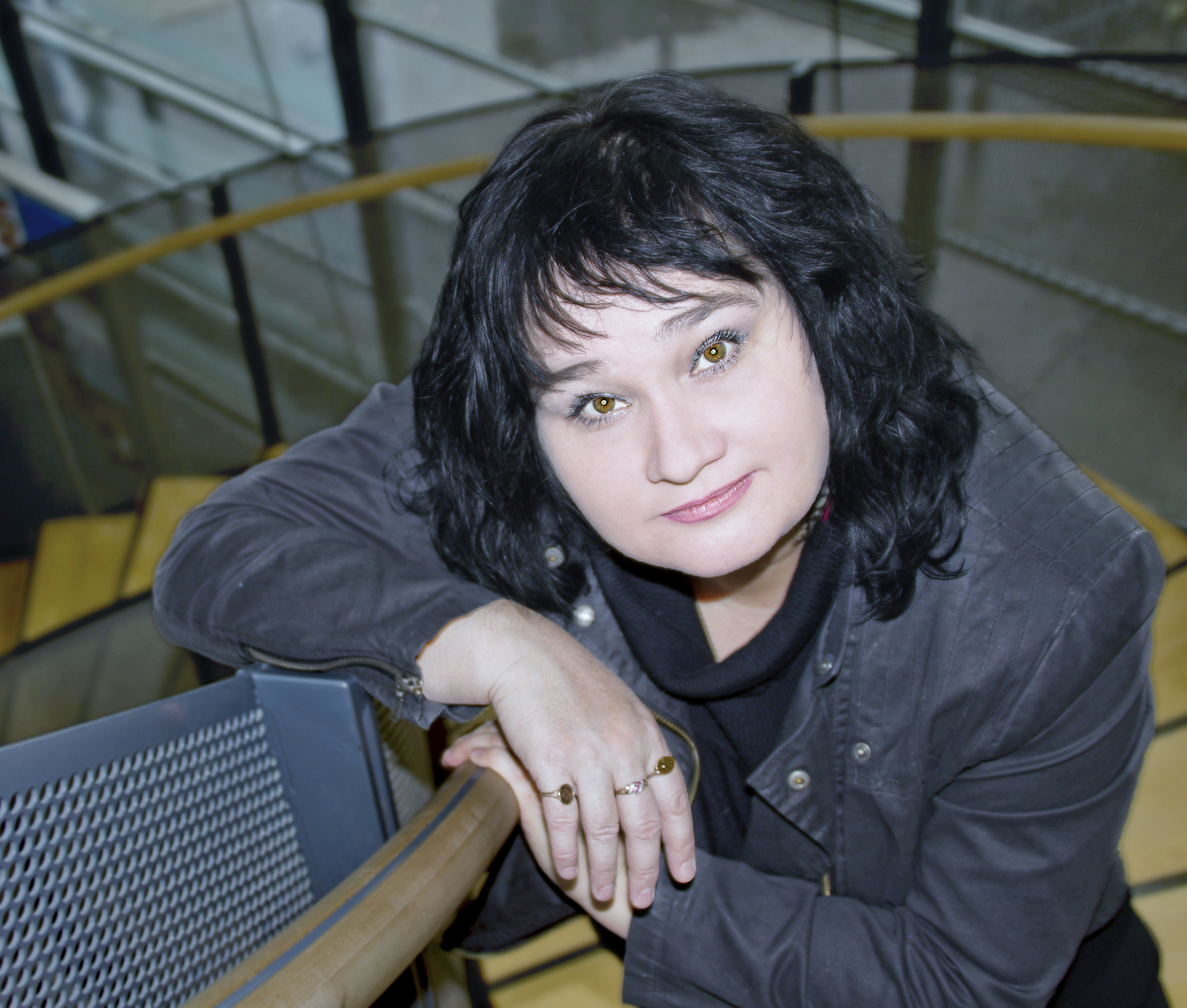 Nina J Hedkrok s. 15.11.1965